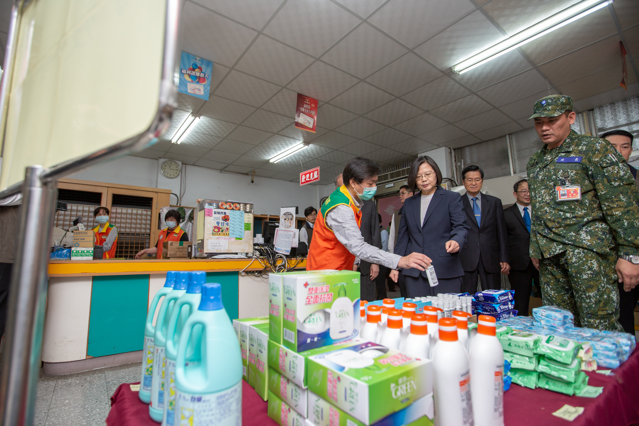 20200324總統視導「陸軍步兵203旅『防疫整備』」